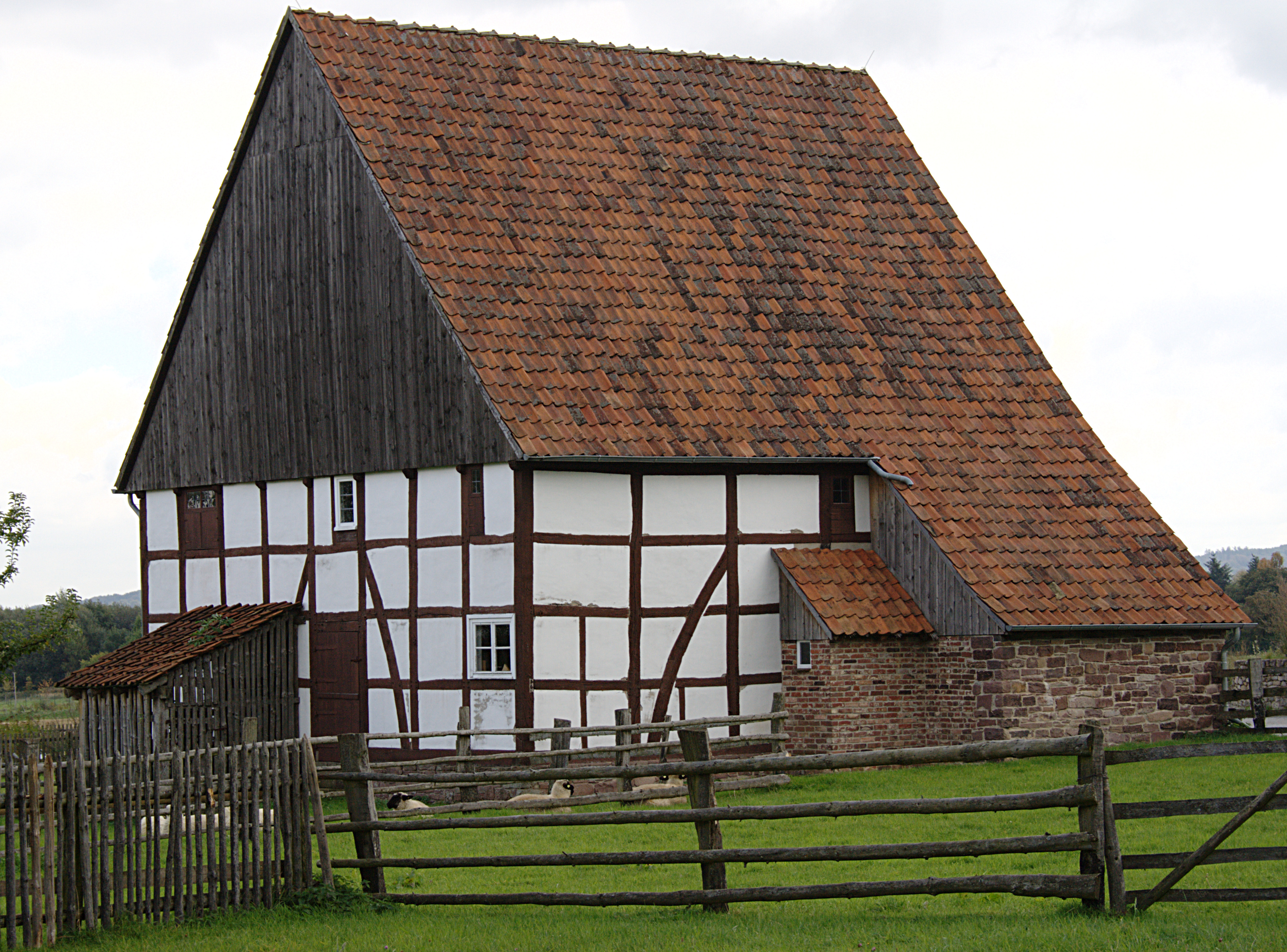 Westfälisches Freilichtmuseum Detmold